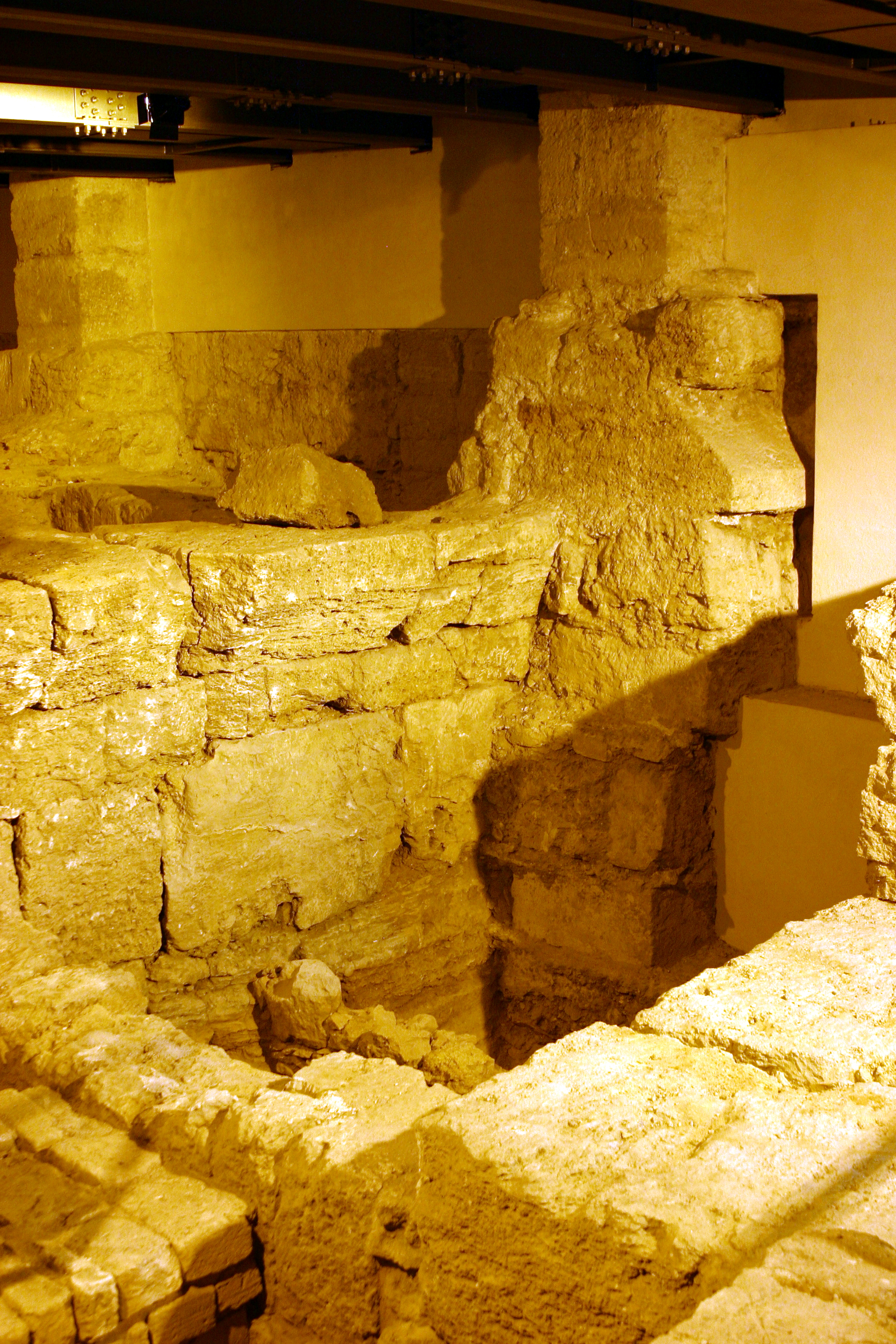 Palazzo dei Normani